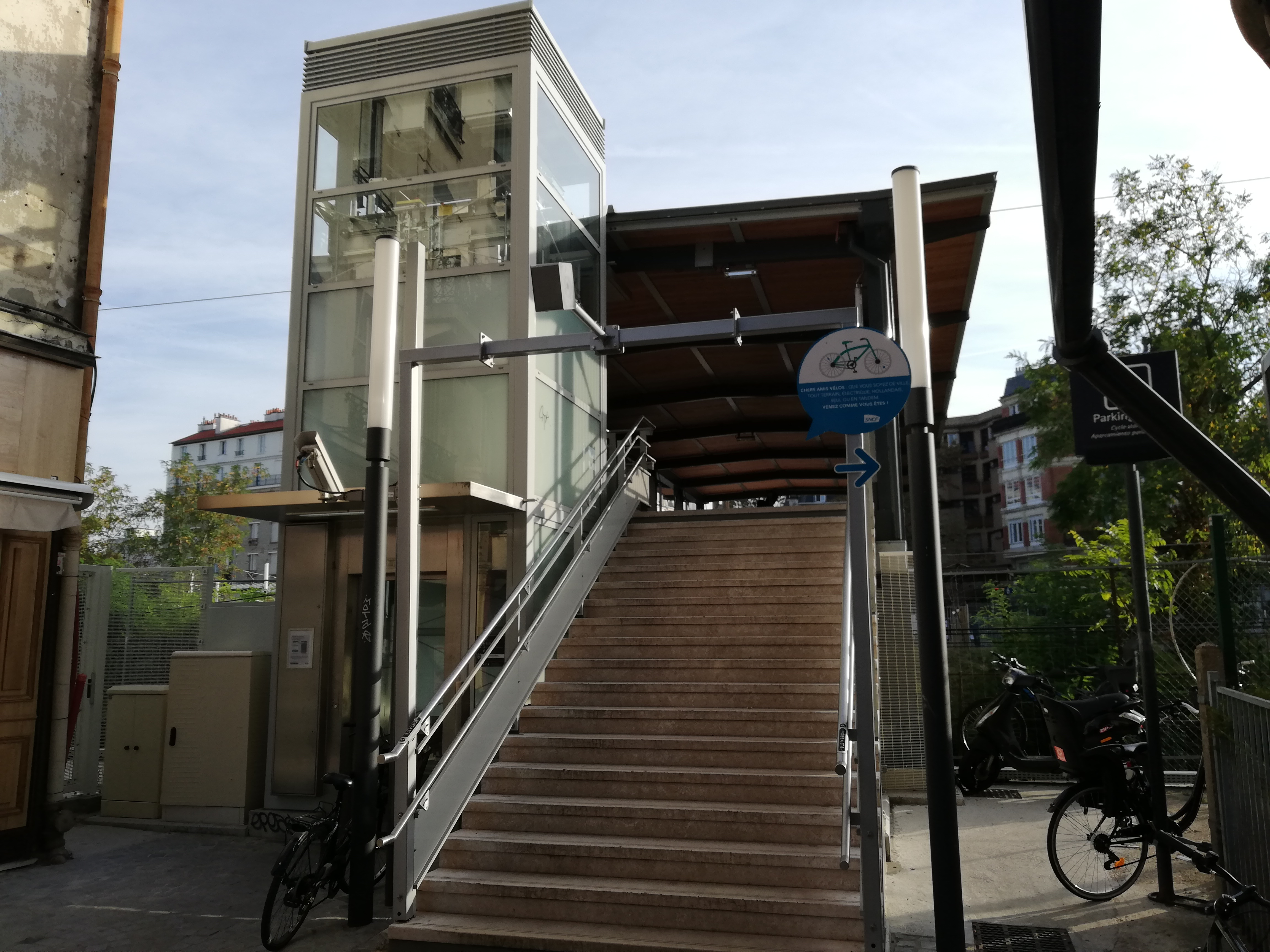 Accès nord de la gare des Vallées, côté Colombes, en 2018.